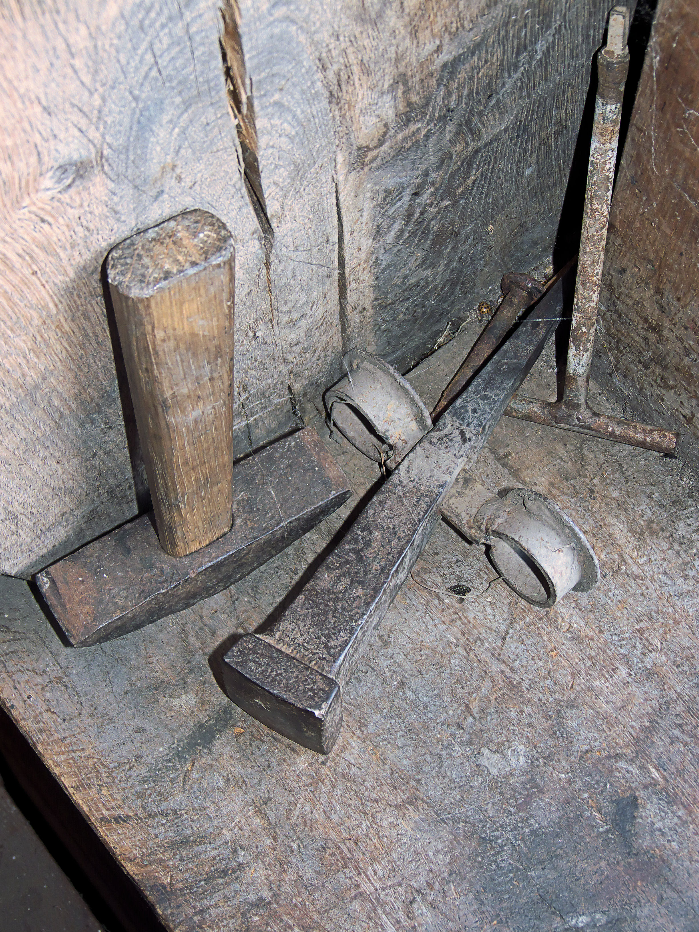 Dengelamboss und Dengelhammer